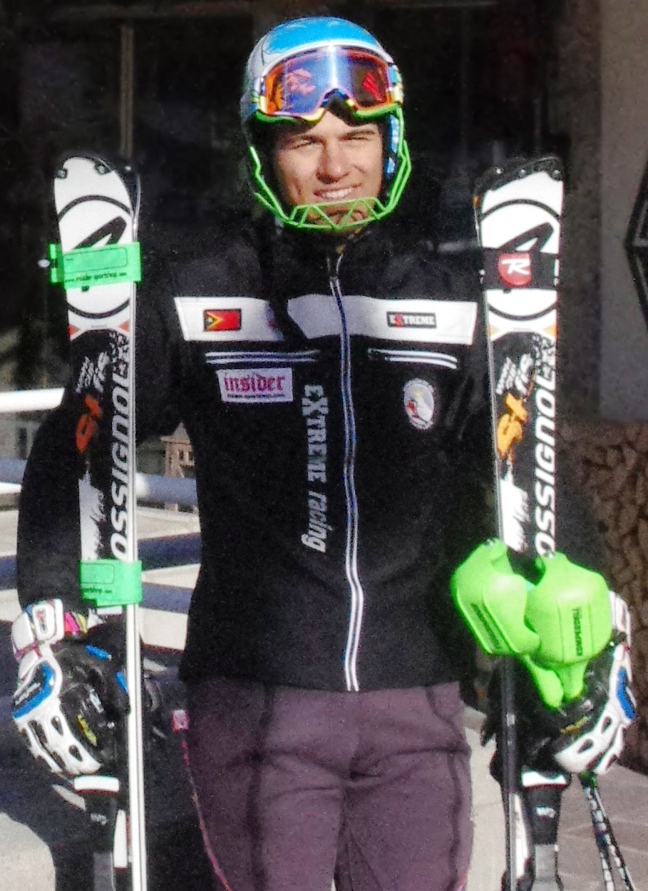 Yohan Goutt Goncalves, osttimoresischer Skiläufer und Olympionike in Sotchi